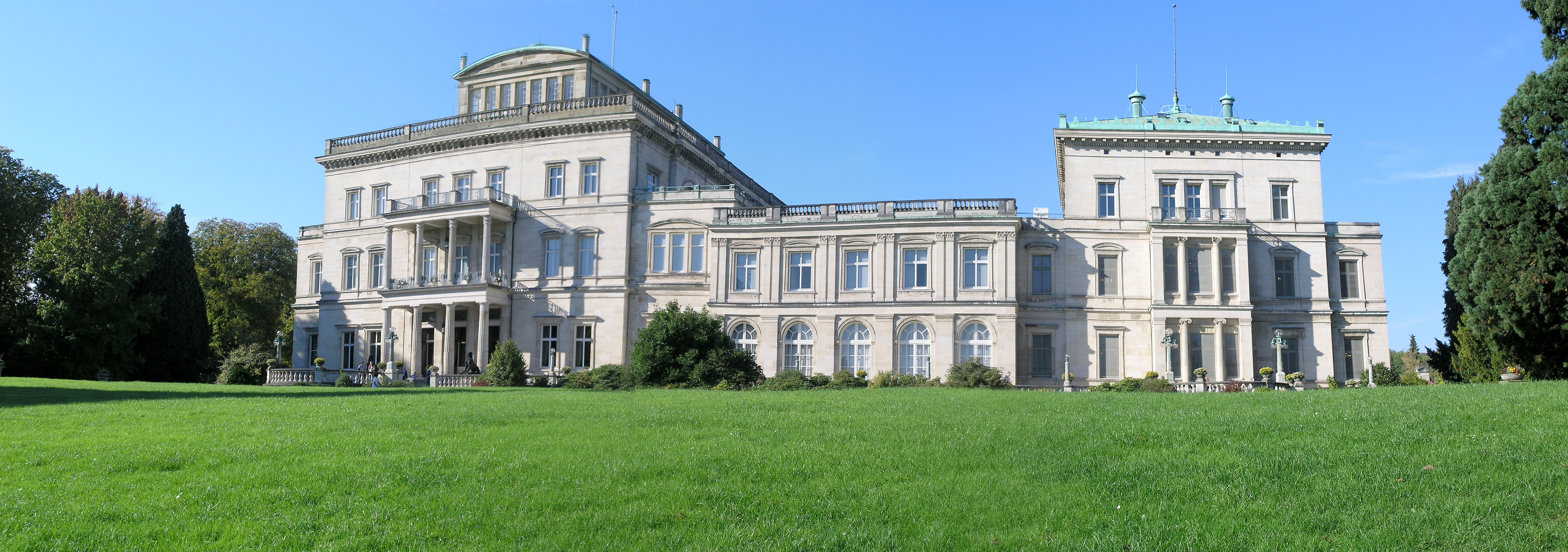 Северный Рейн - Вестфалия, Эссен - вилла Хюгель